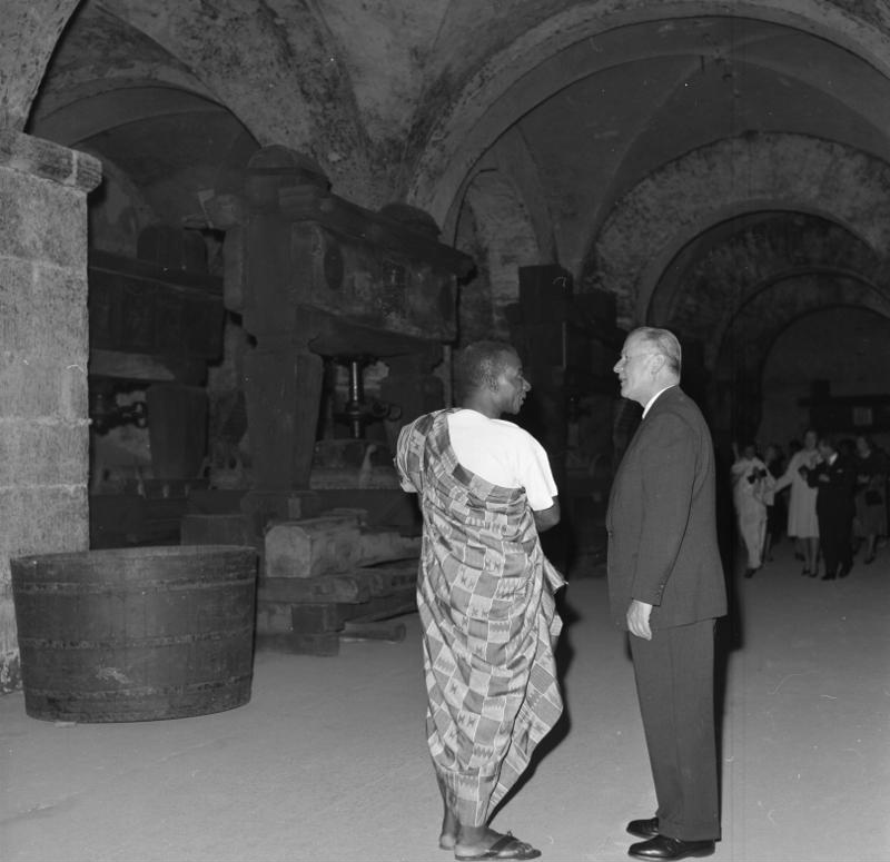 Staatspräsident von Togo, Olympio, zur Weinprobe im Kloster Eberbach